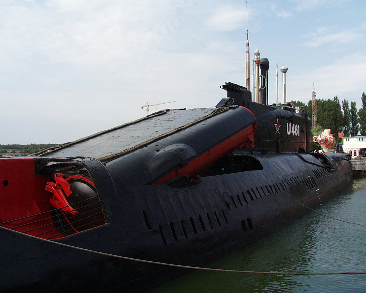 Die Abschussrohre für die Raketen